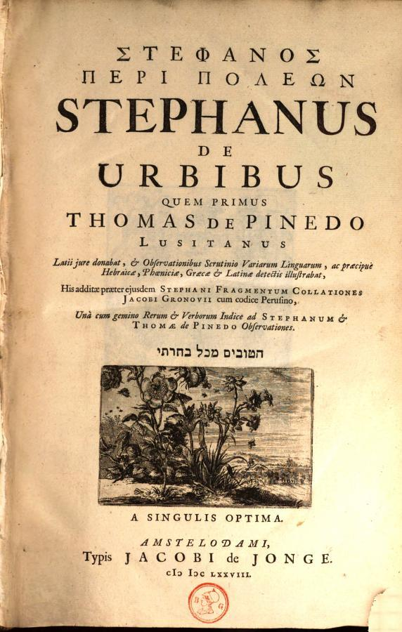 первая страница издания "Этники" Стефана Византийского, озаглавленное "Στέφανος Περὶ Πόλεων" издательство Jacobus de Jonge, 1678